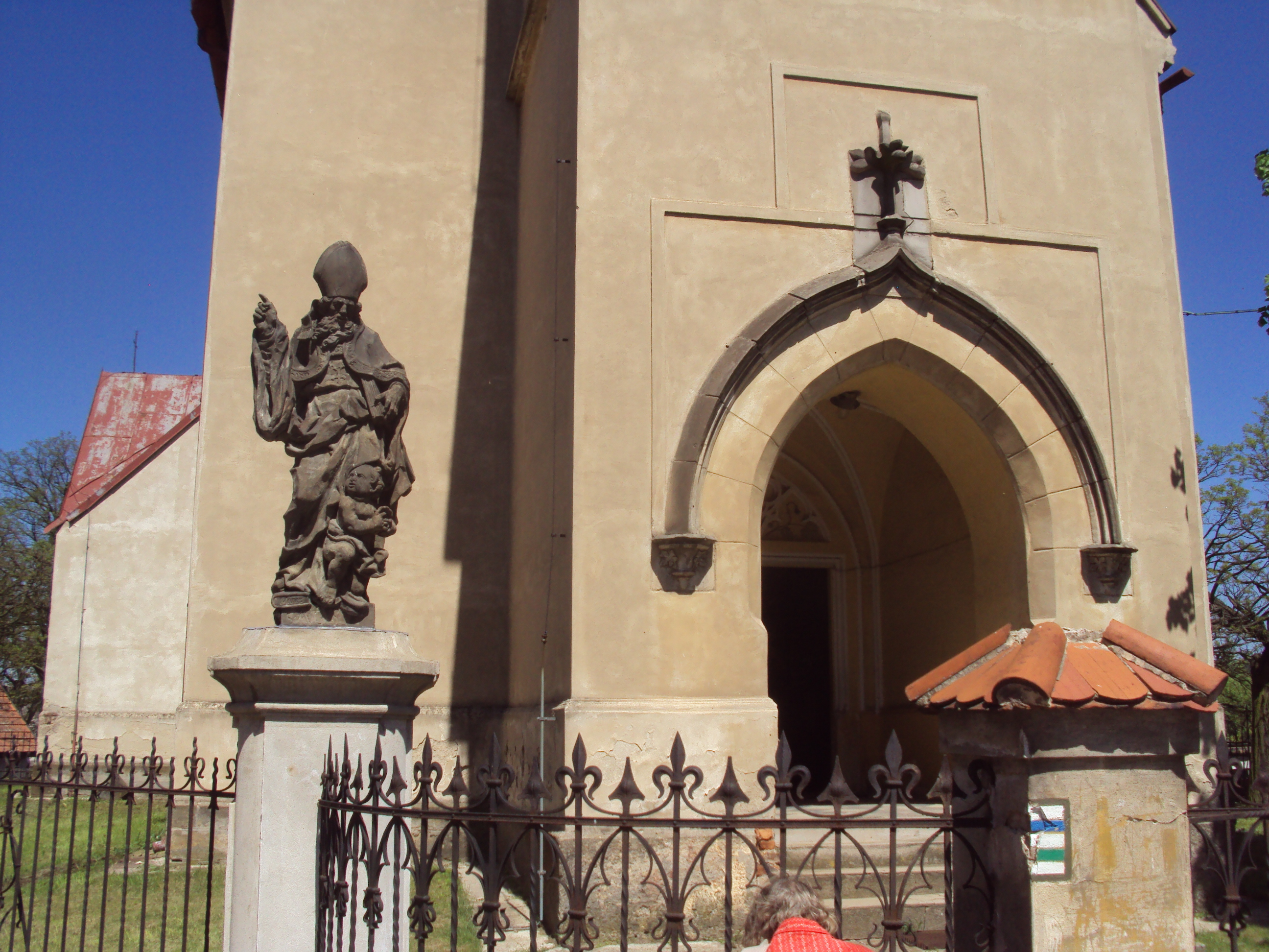 Kostel svatého Martina ve Vidimi, socha sv. Augustina